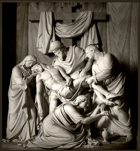 capela lateral da Igreja Trinità dei Monti, Roma.